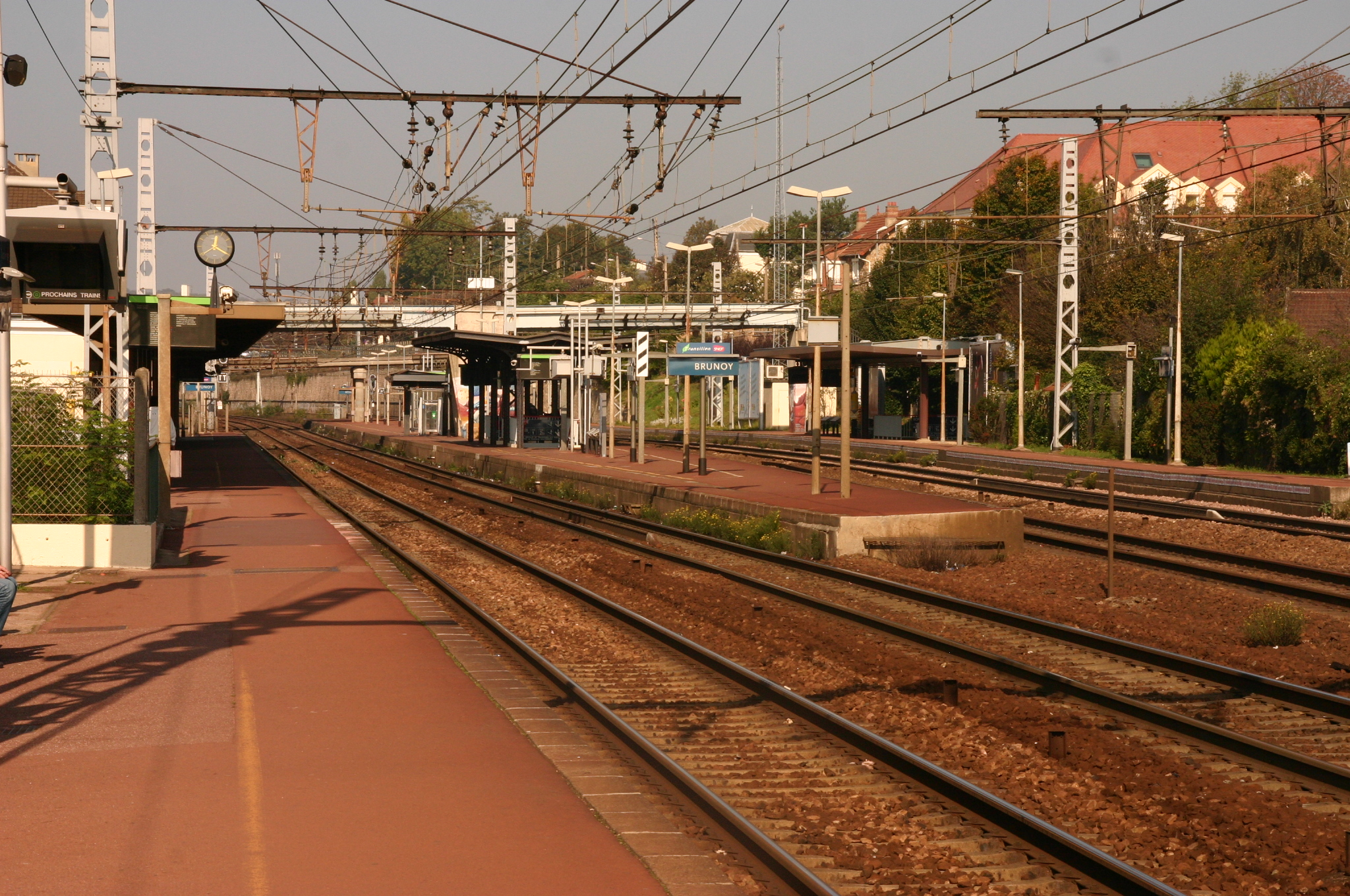 La Gare de Brunoy, Brunoy, département de l'Essonne, France